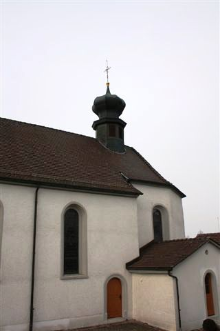 Kapelle Büttikon, Aargau, Schweiz